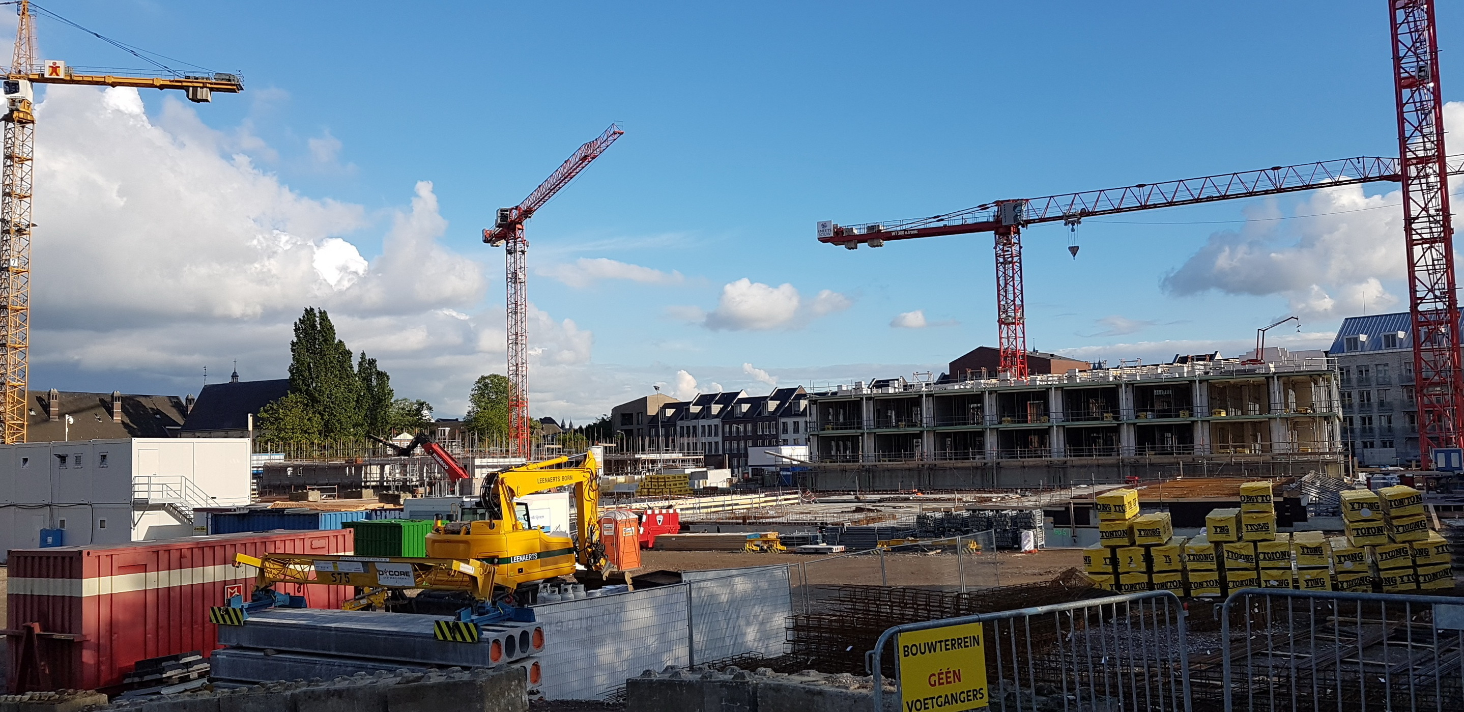 Bouwproject Sphinx-Zuid in het Statenkwartier in Maastricht.